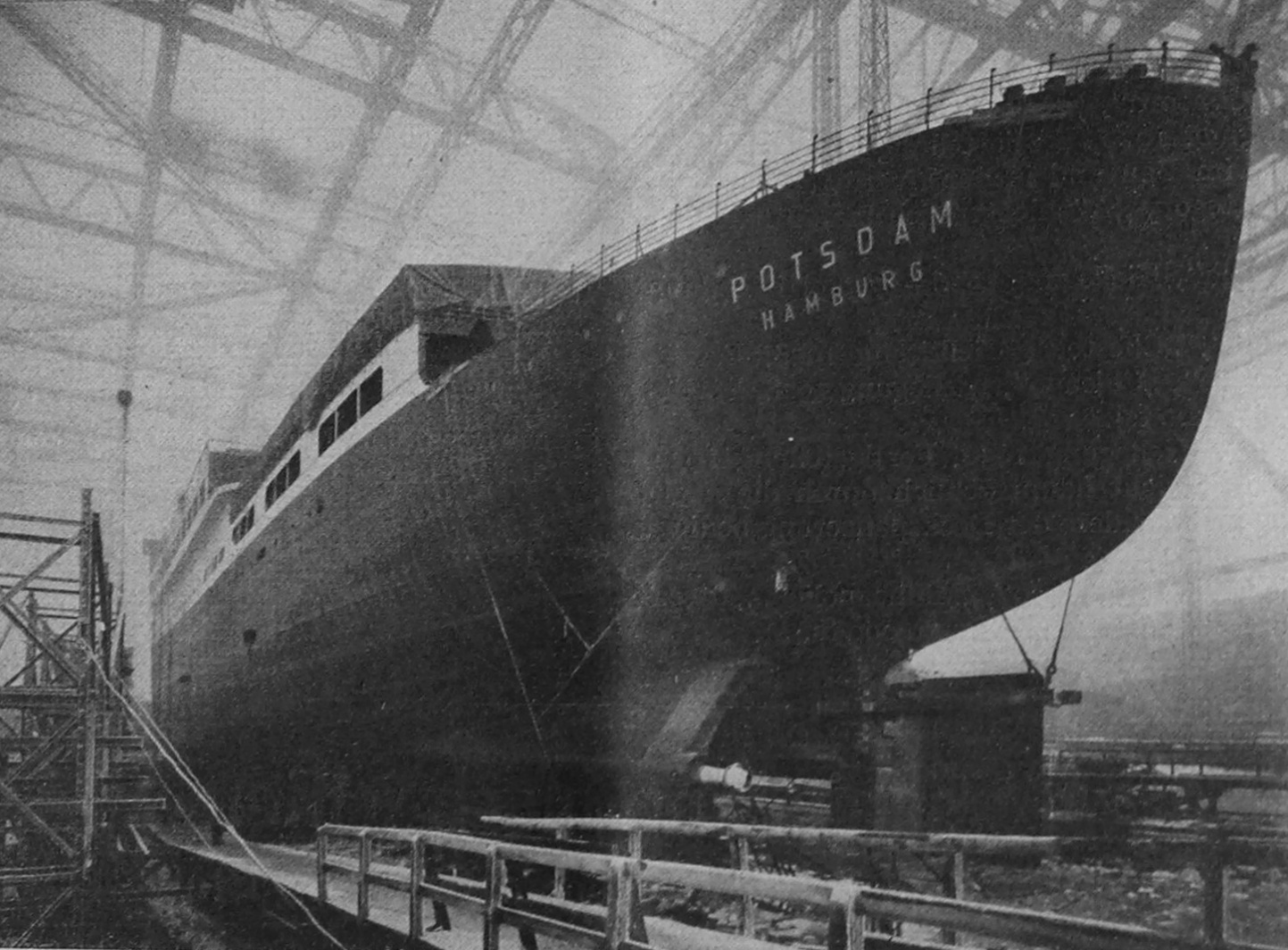 Werftbild des Hapag-Schiffes Potsdam 1935